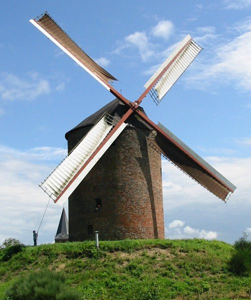 Torenmolen te Zeddam (Foto: Hans de Kroon)